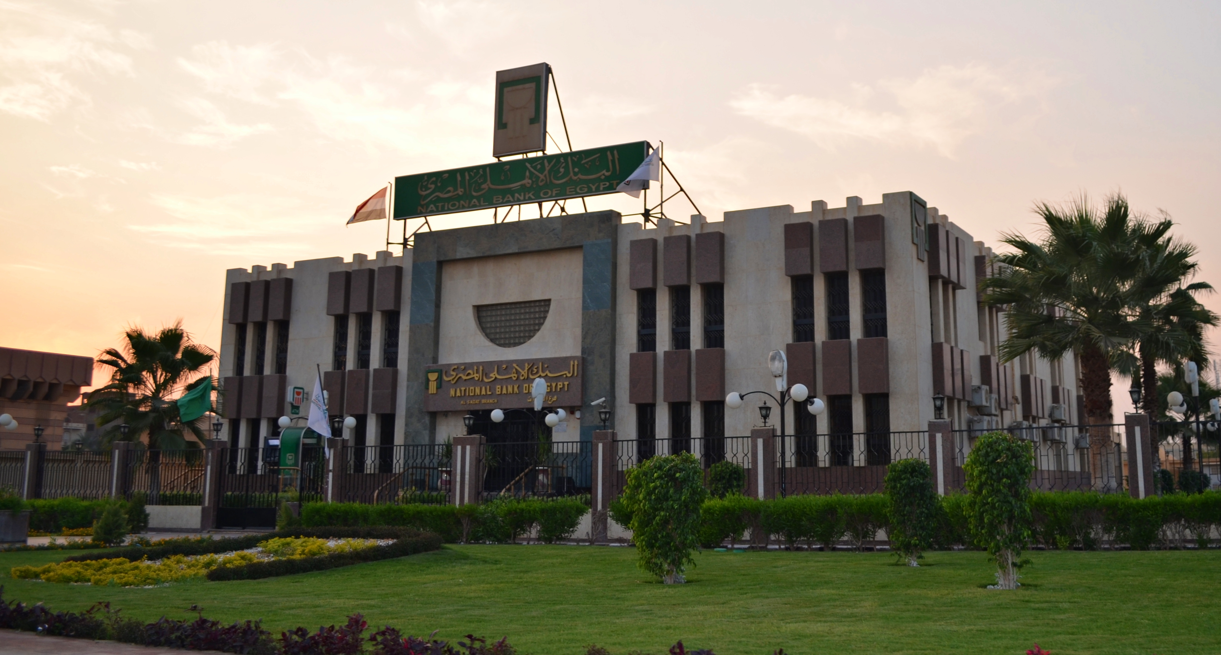 البنك الأهلي المصري، فرع مدينة السادات